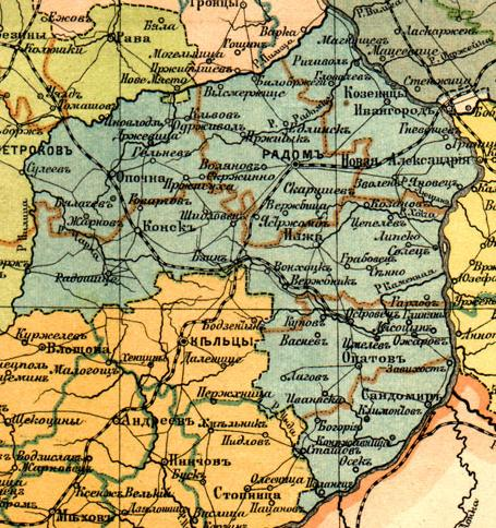 Радомская губерния в 1896 году